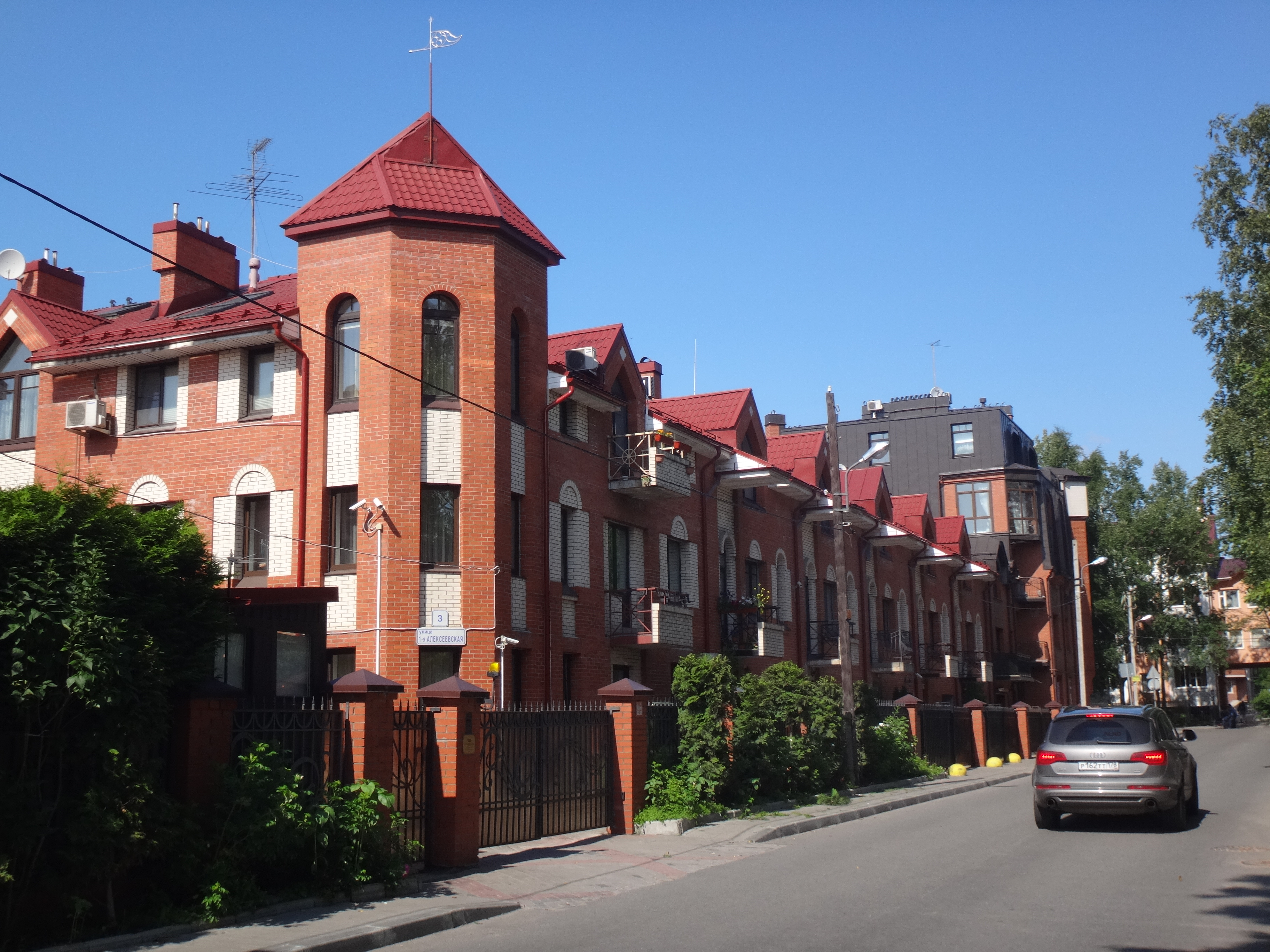 Таунхаусы на Земледельческом переулке в Питере